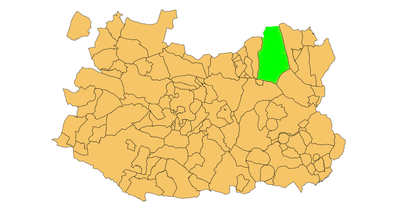 Alcazar de San Juan municipality map